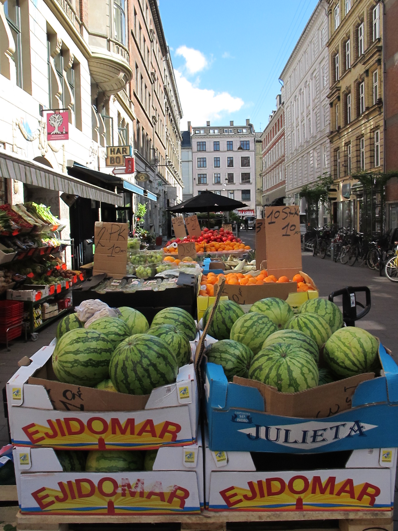 Blåhimmelsgade